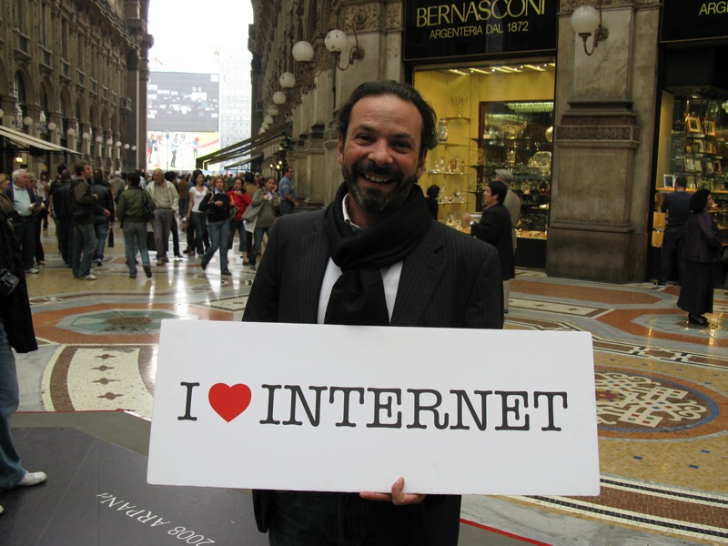 Alberto D'Ottavi